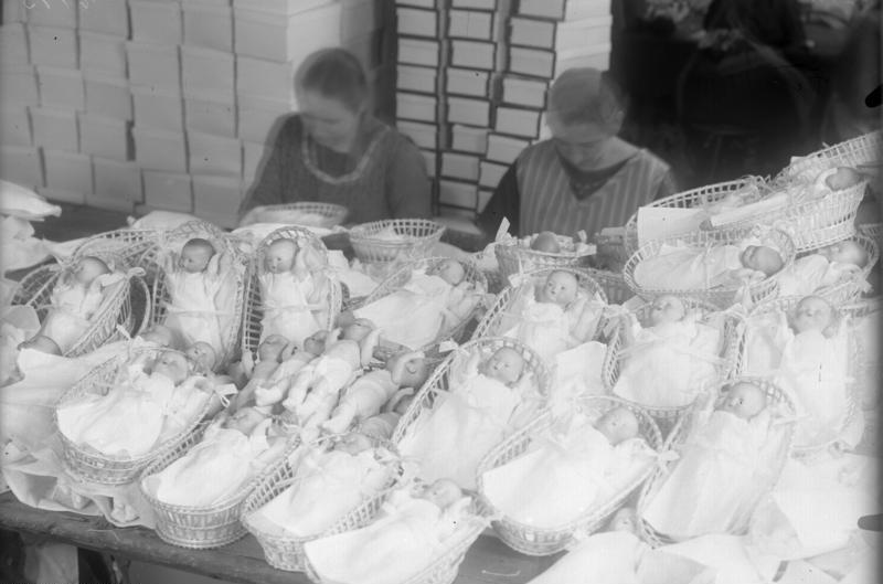 Hochbetrieb beim "Weihnachtsmann"! Weihnachtspüppchen in der Spielwarenstadt Sonneberg in Thüringen werden für den Weihnachtstisch versandfertig gemacht.